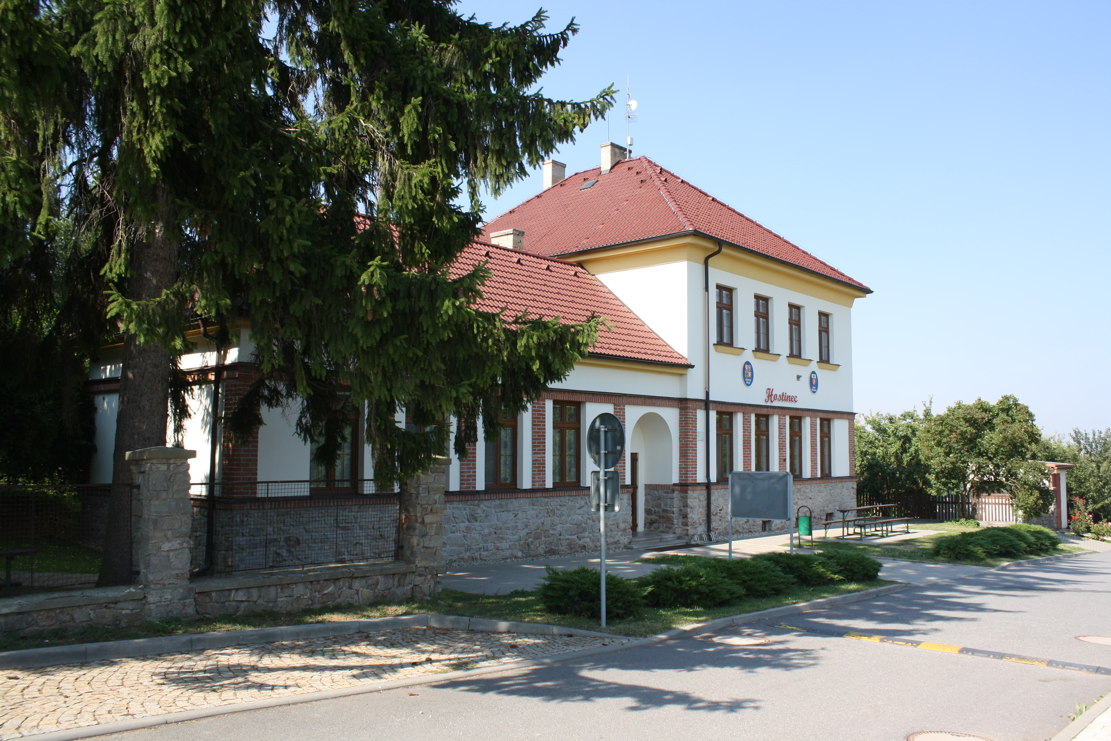 Radnice, hospoda a obchod ve Slatině